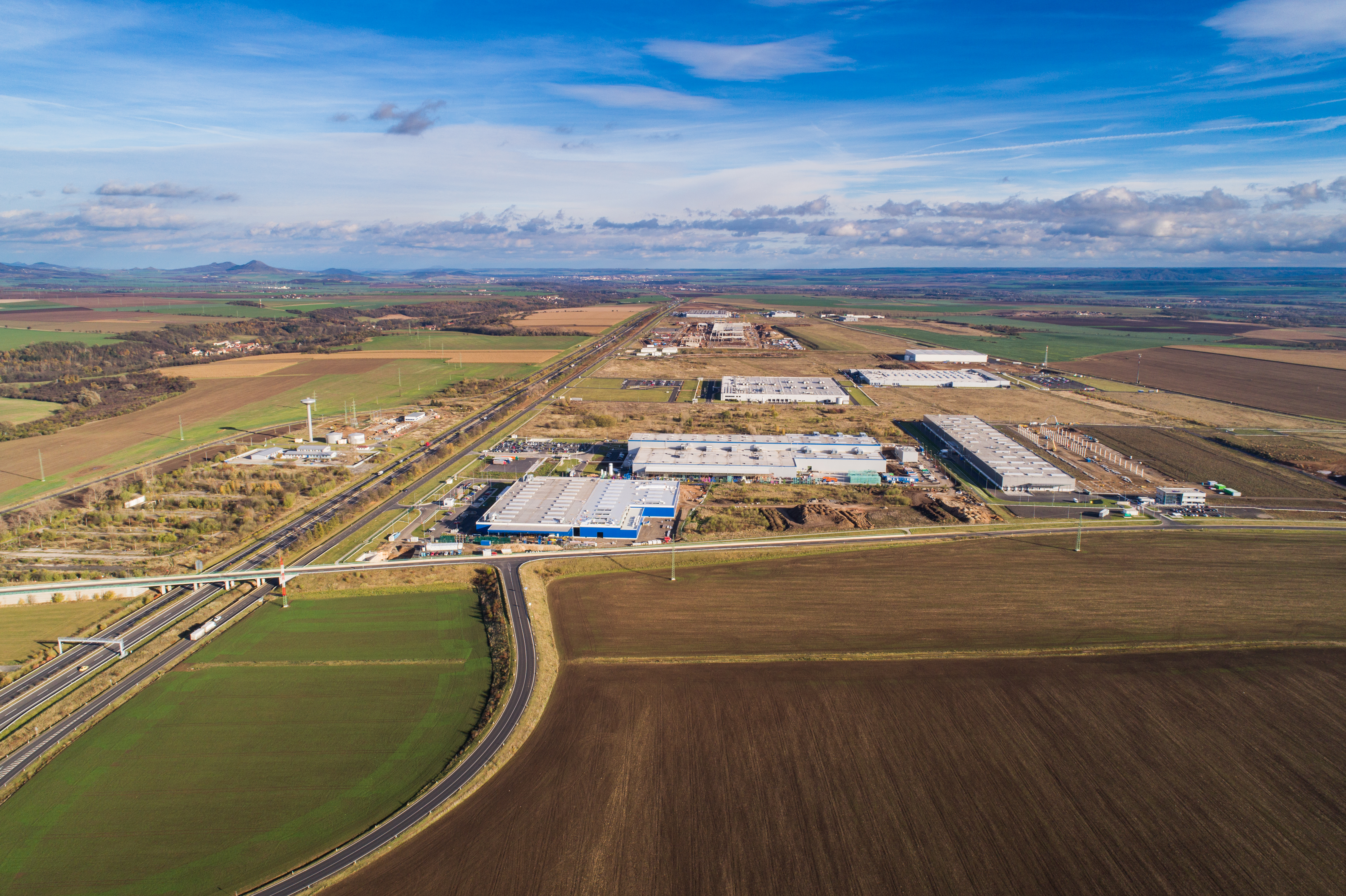 Pohled na průmyslovou zónu Triangle od západu.